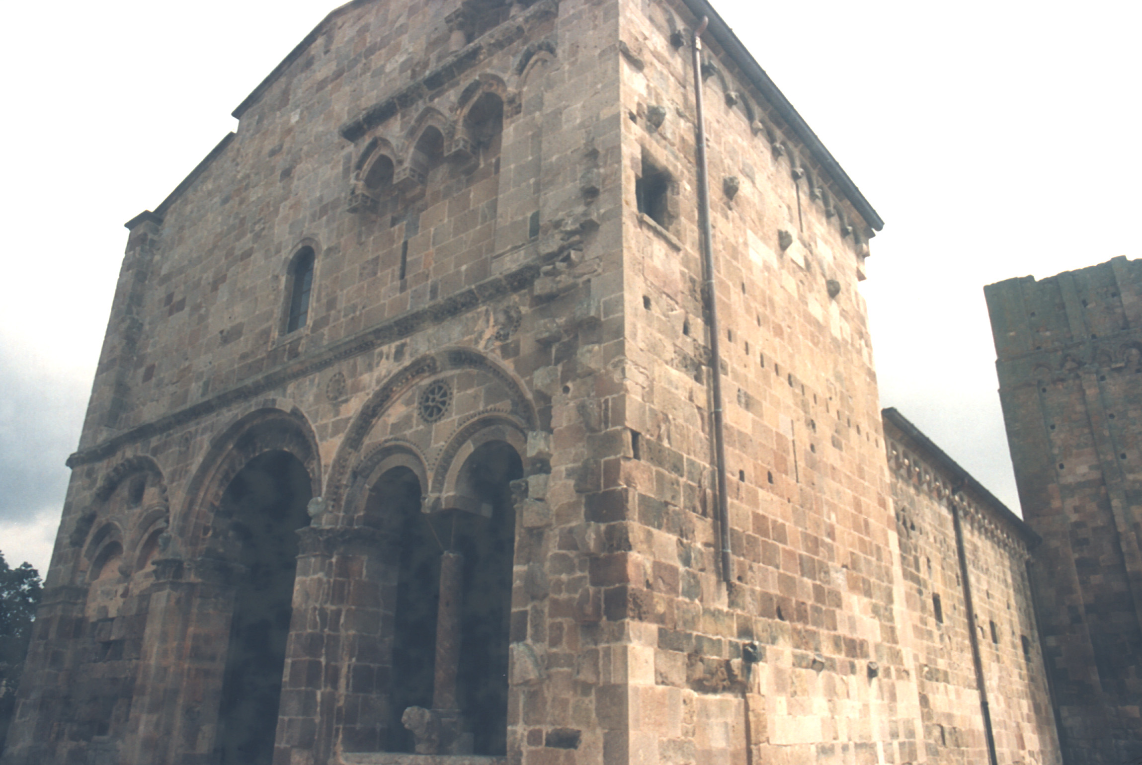 Basilica di Sant'Antioco di Bisarcio (XII secolo), presso Ozieri (SS), Sardegna